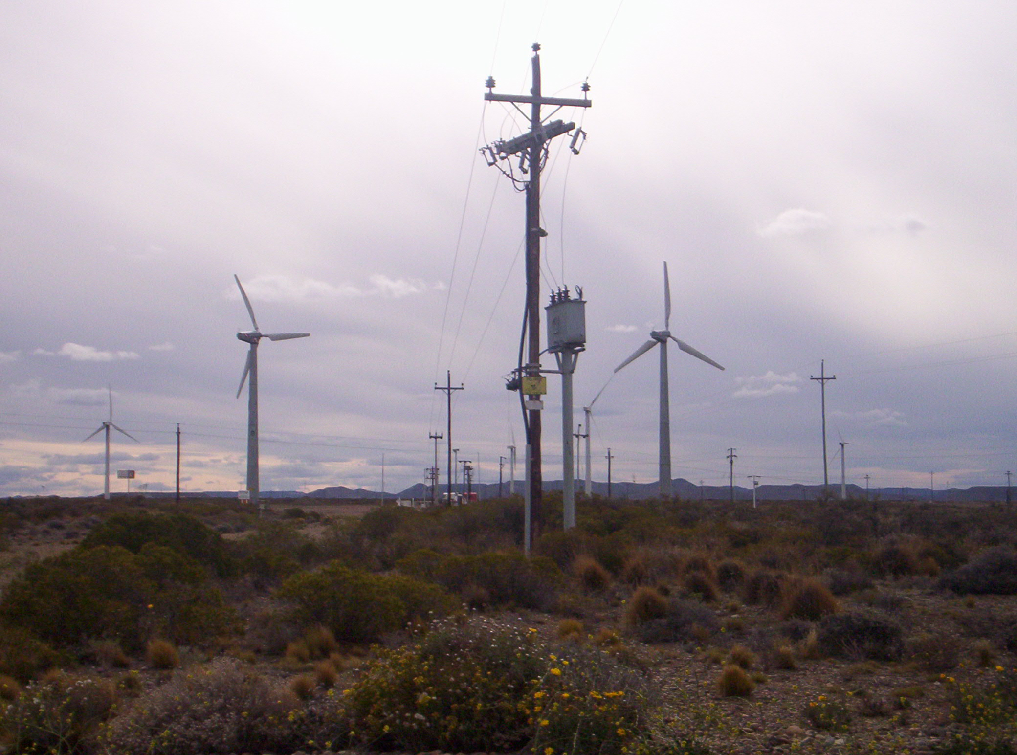 VISTA DE PARTE DEL PARKE EOLICO